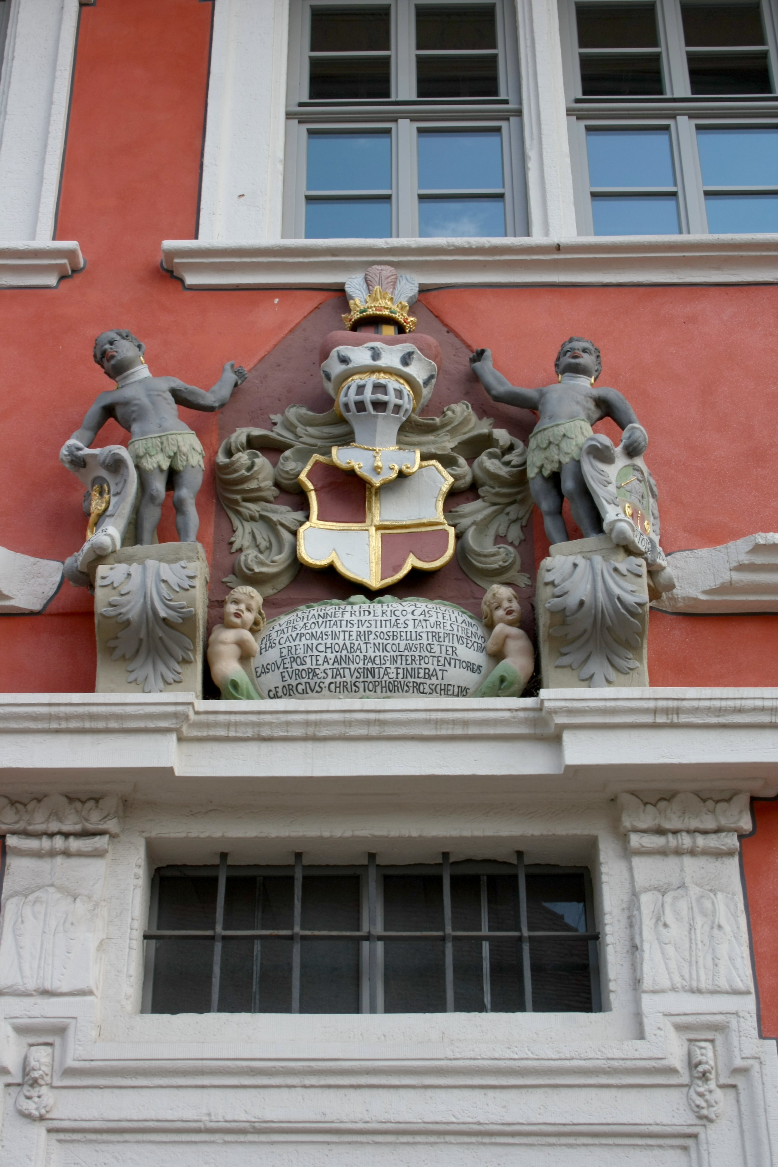 ehemaliges Gasthaus Zum Goldenen Löwen in Rödelsee im Landkreis Kitzingen (Bayern)